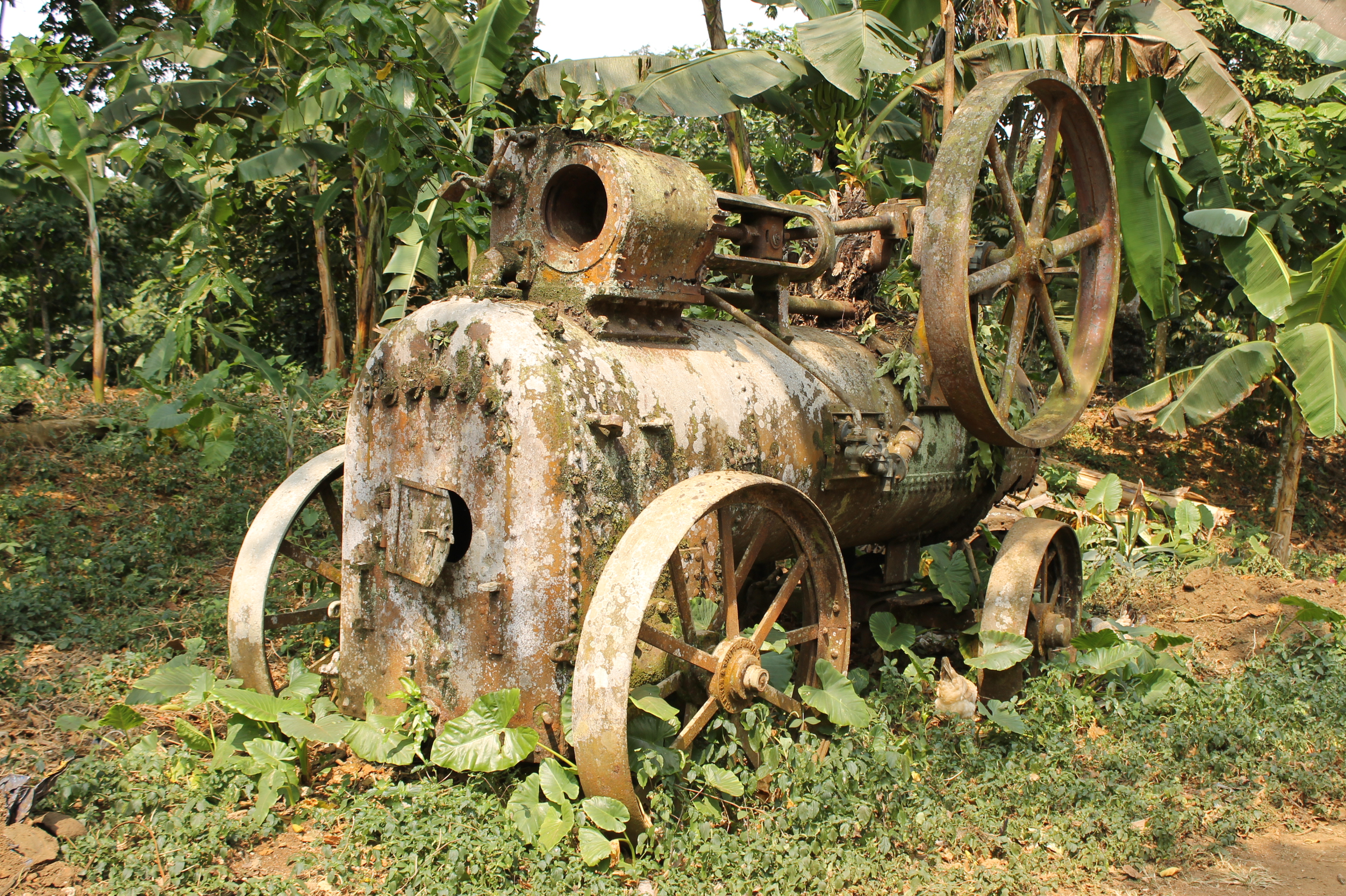 Antigua maquina de la Roça Sundy This is an image of the Biosphere Reserve or a Geopark: Island of Príncipe Biosphere Reserve